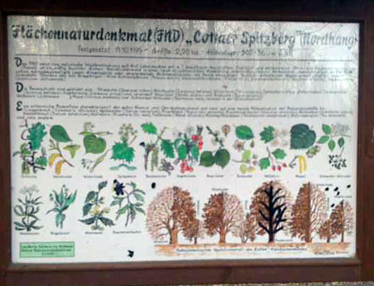 Flächennaturdenkmal Cottaer Spitzberg